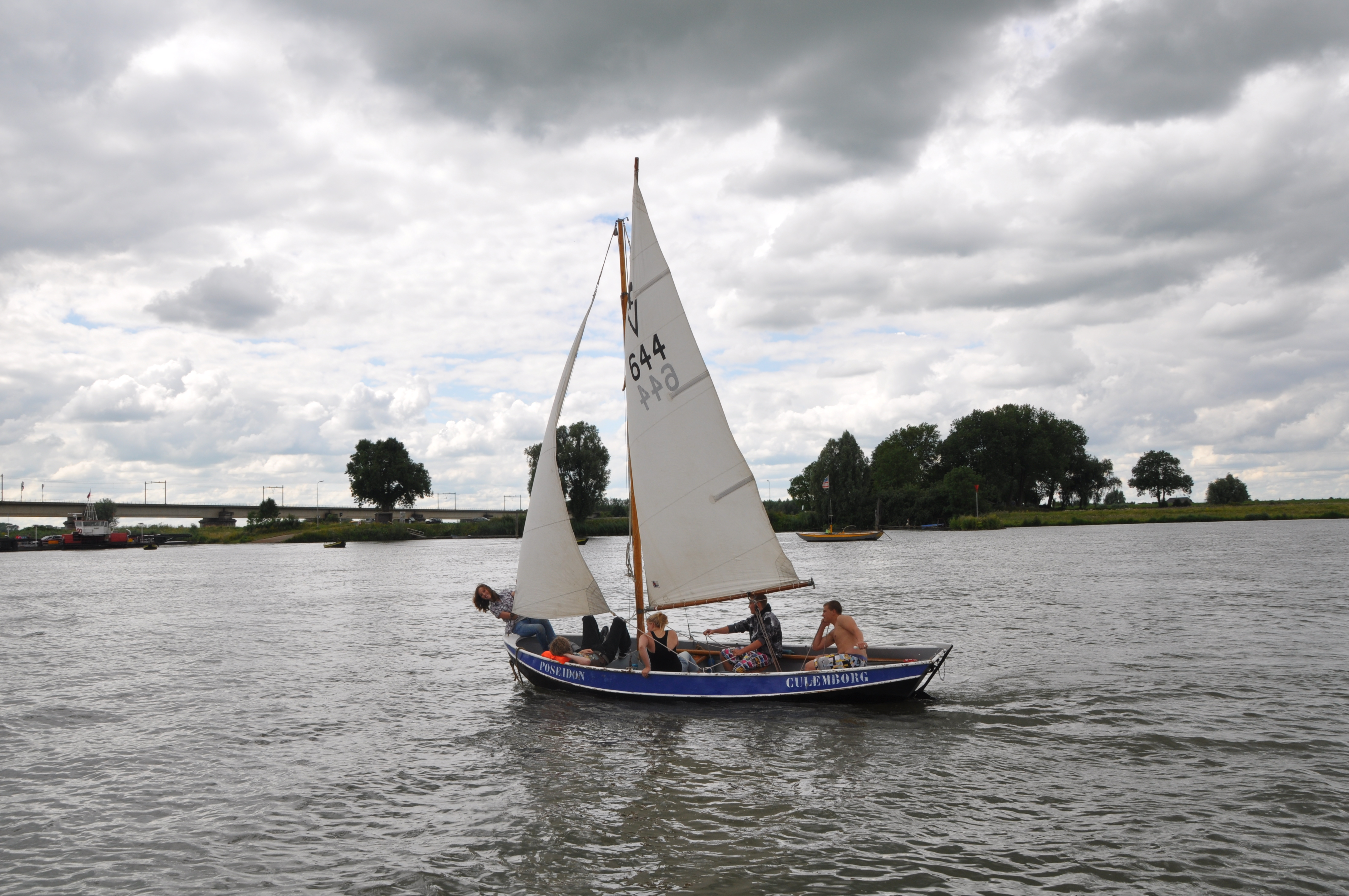 De lelievletten van Triton Scouting Culemborg op de Lek